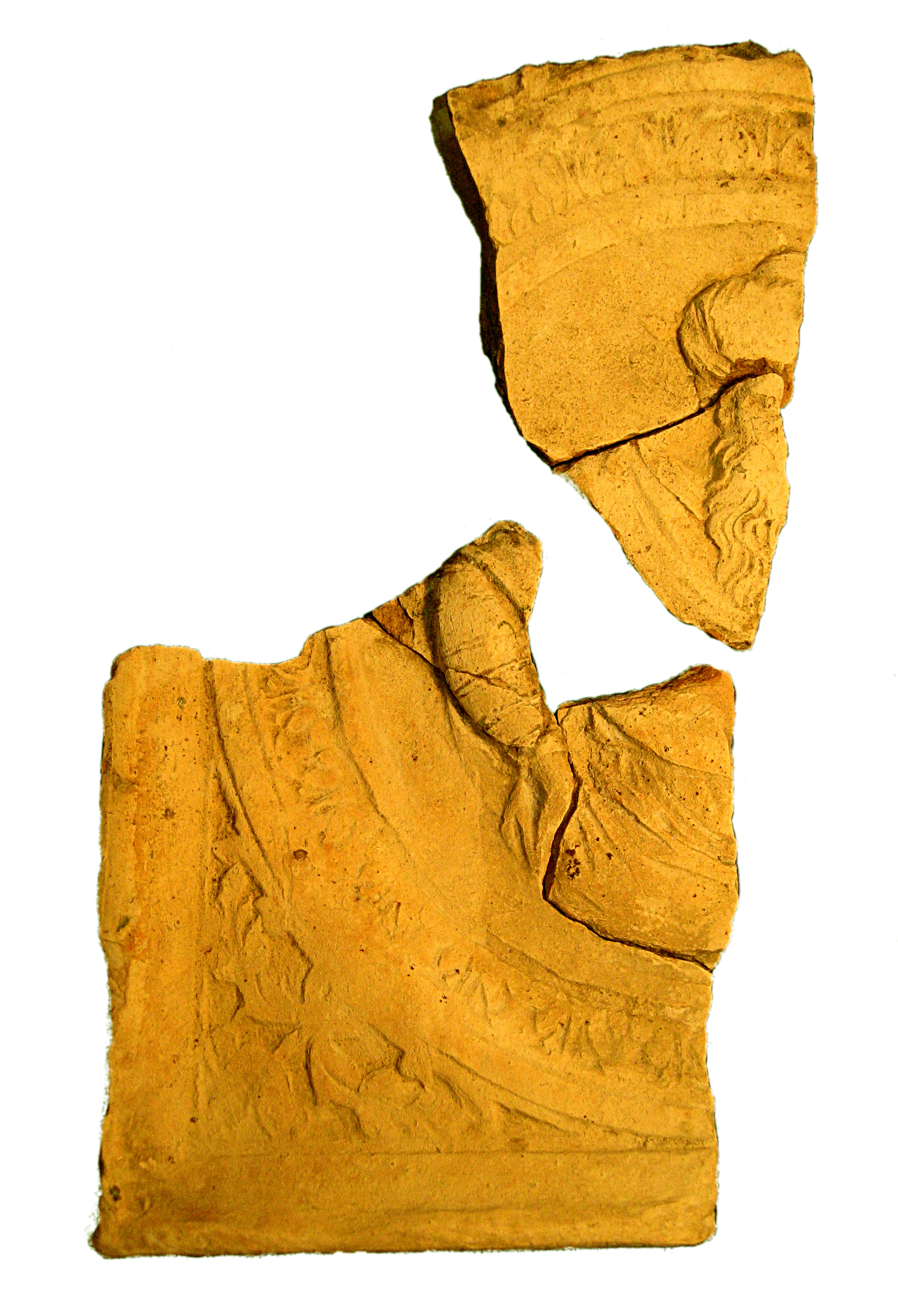 Fragment einer Türkenkachel aus Höhenberg